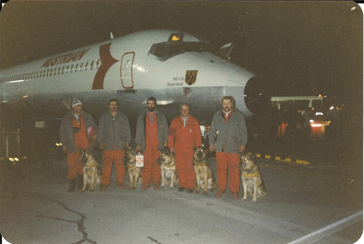 Hundeführer der ÖRHB unterwegs nach Armenien zum Erdbebeneinsatz 1988